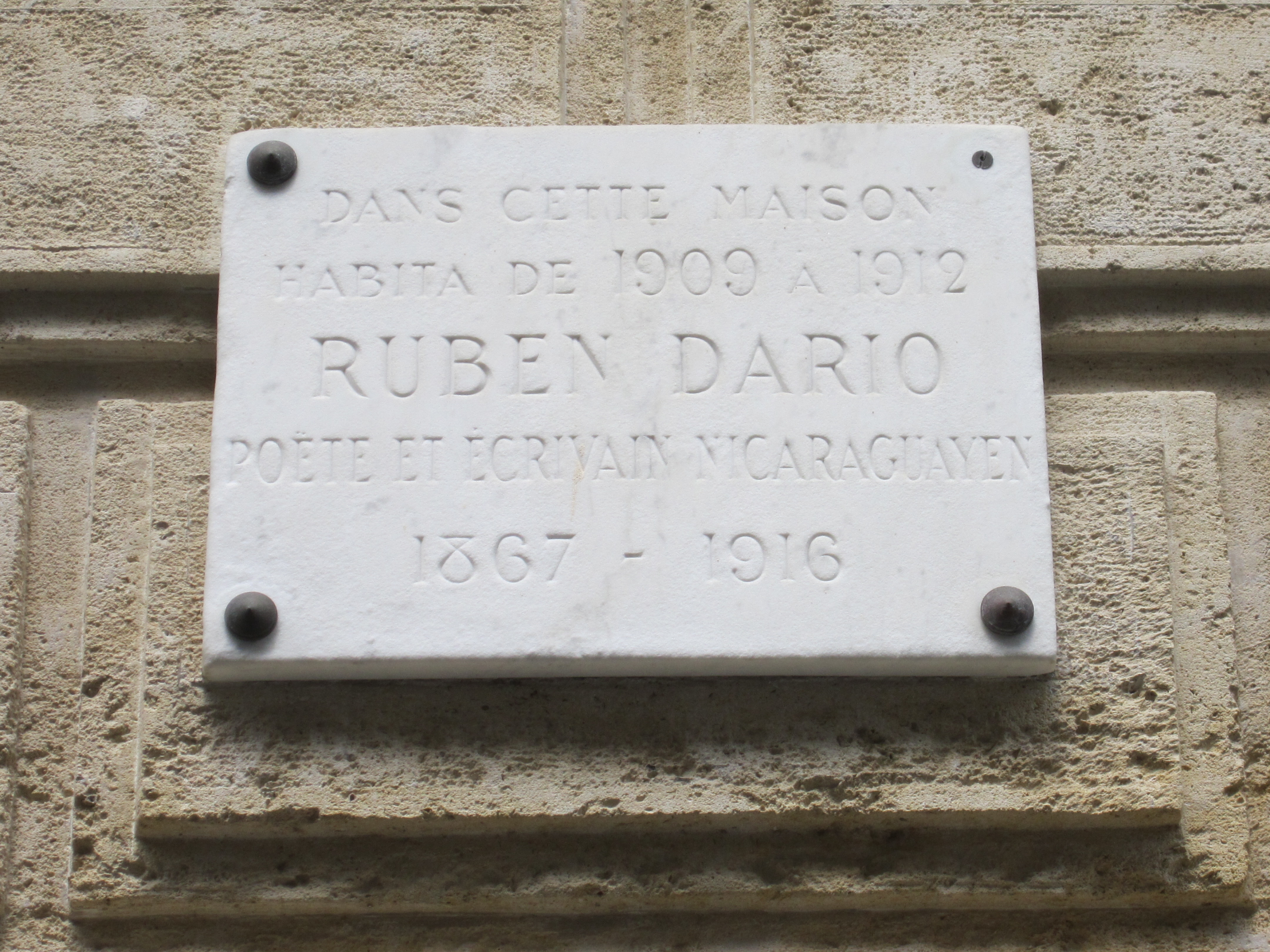 No.4 rue Herschel. 75006 Paris. Dans cette maison habita Rubén Darío de 1909 à 1912.